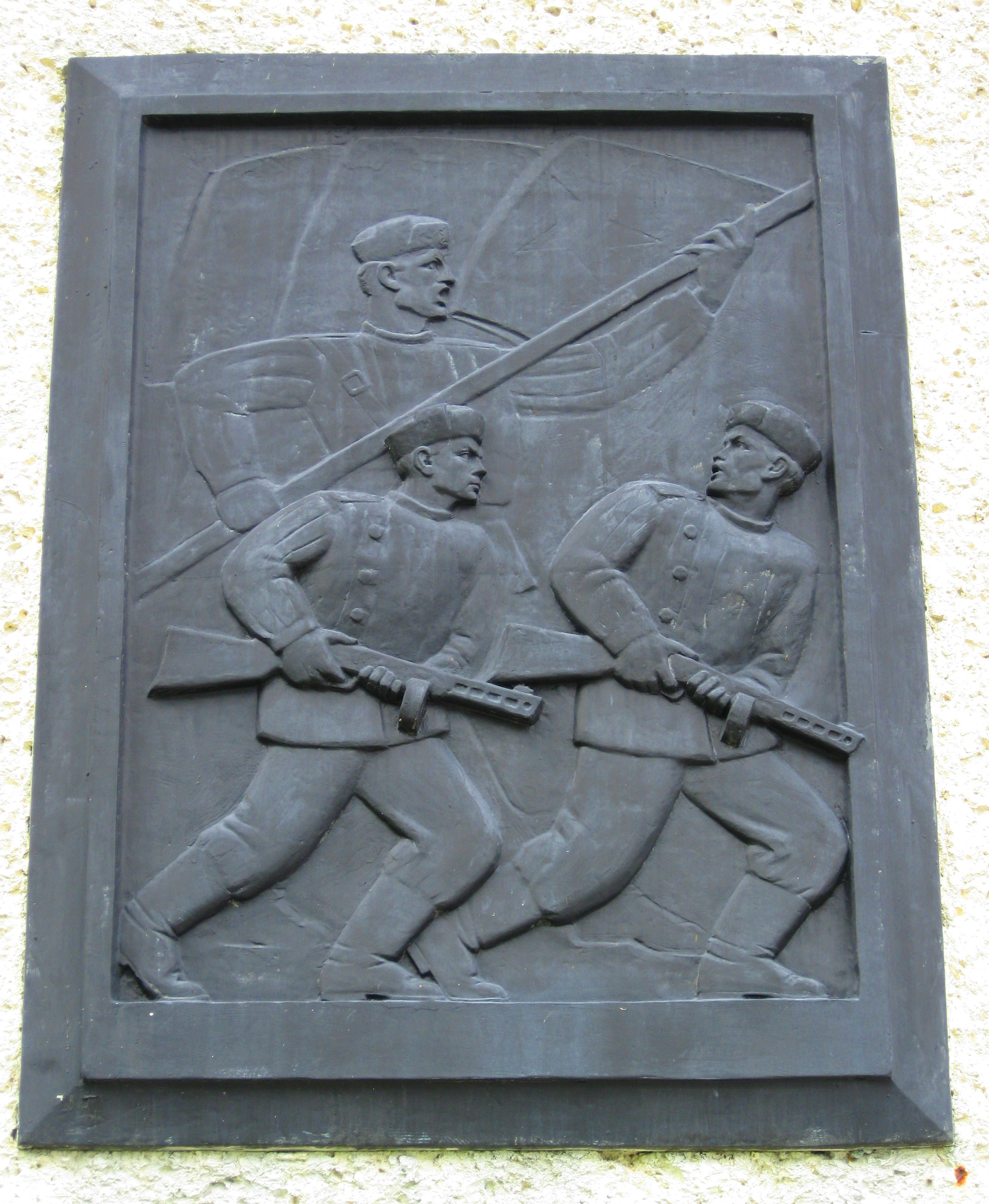 Jedna z tablic przy wejściu na cmentarz żołnierzy radzieckich w Cybince (płaskorzeźba przestawiająca radziecką piechotę).